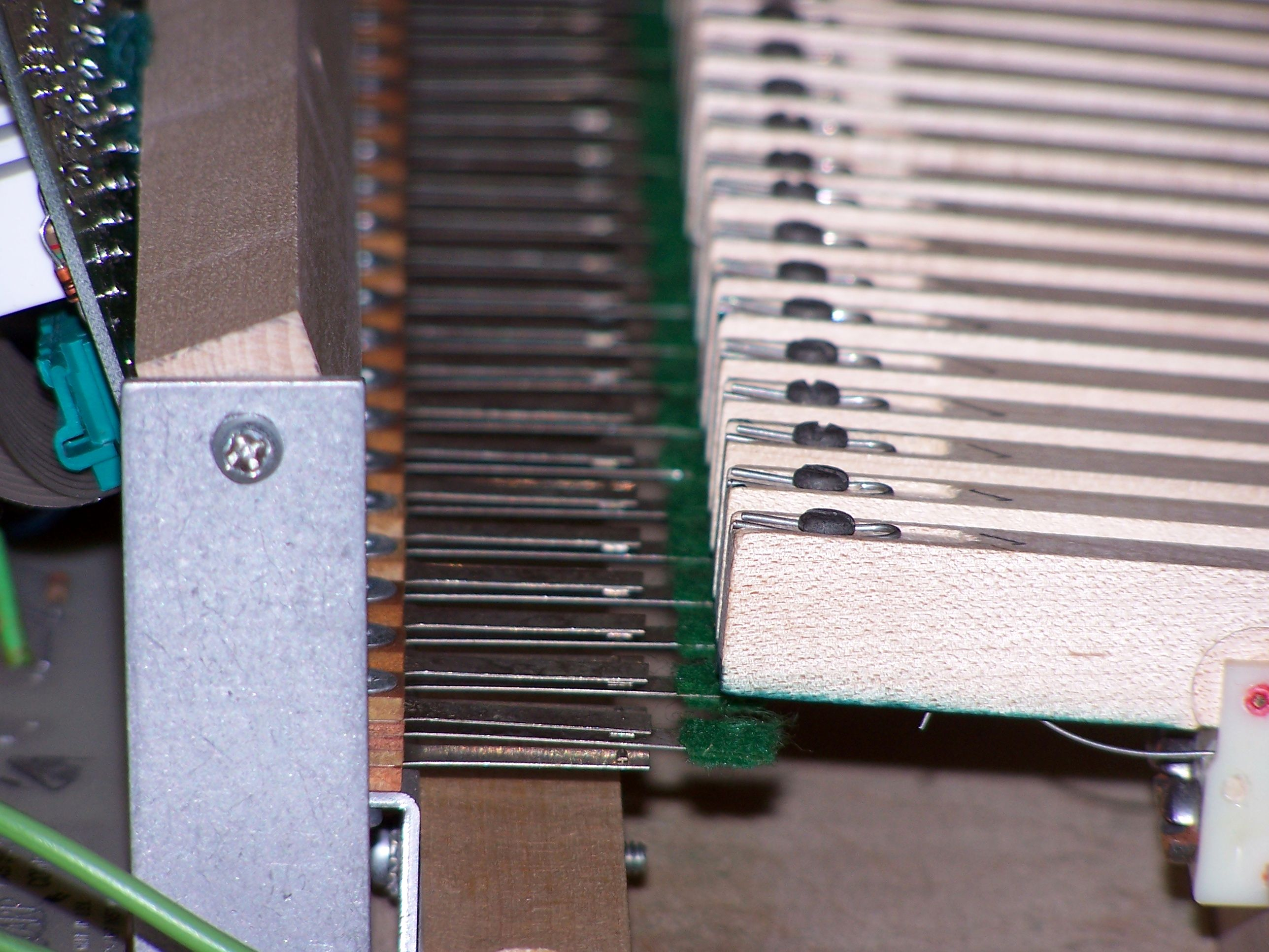 Dettagli dei contatti